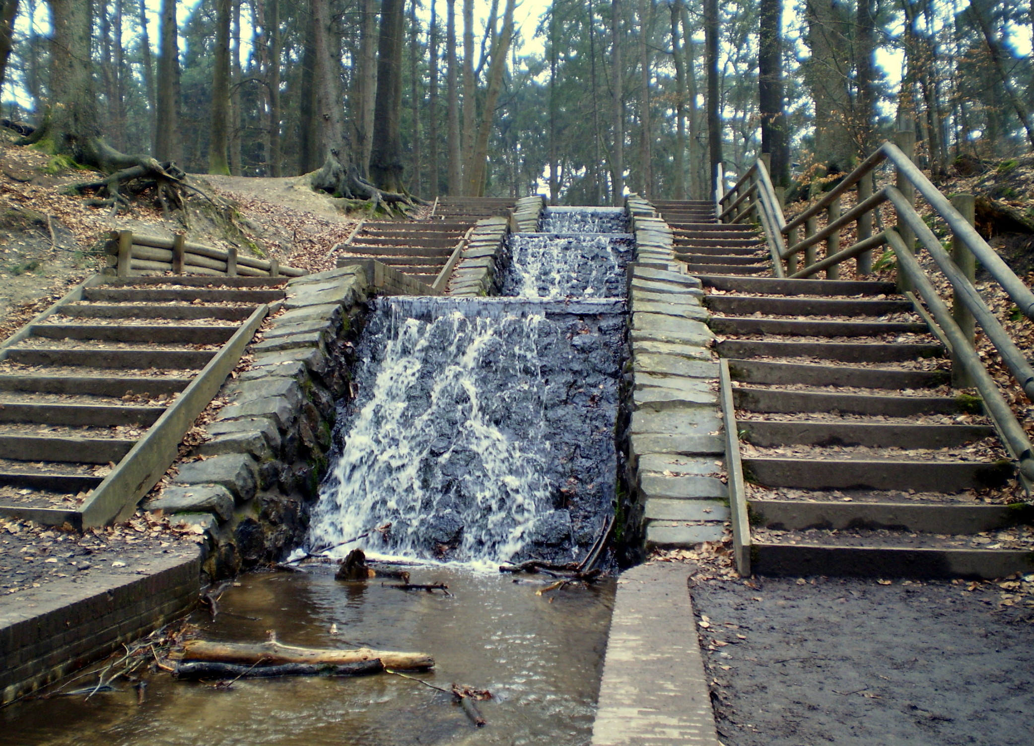 Vrijenberger Spreng, waterfall big